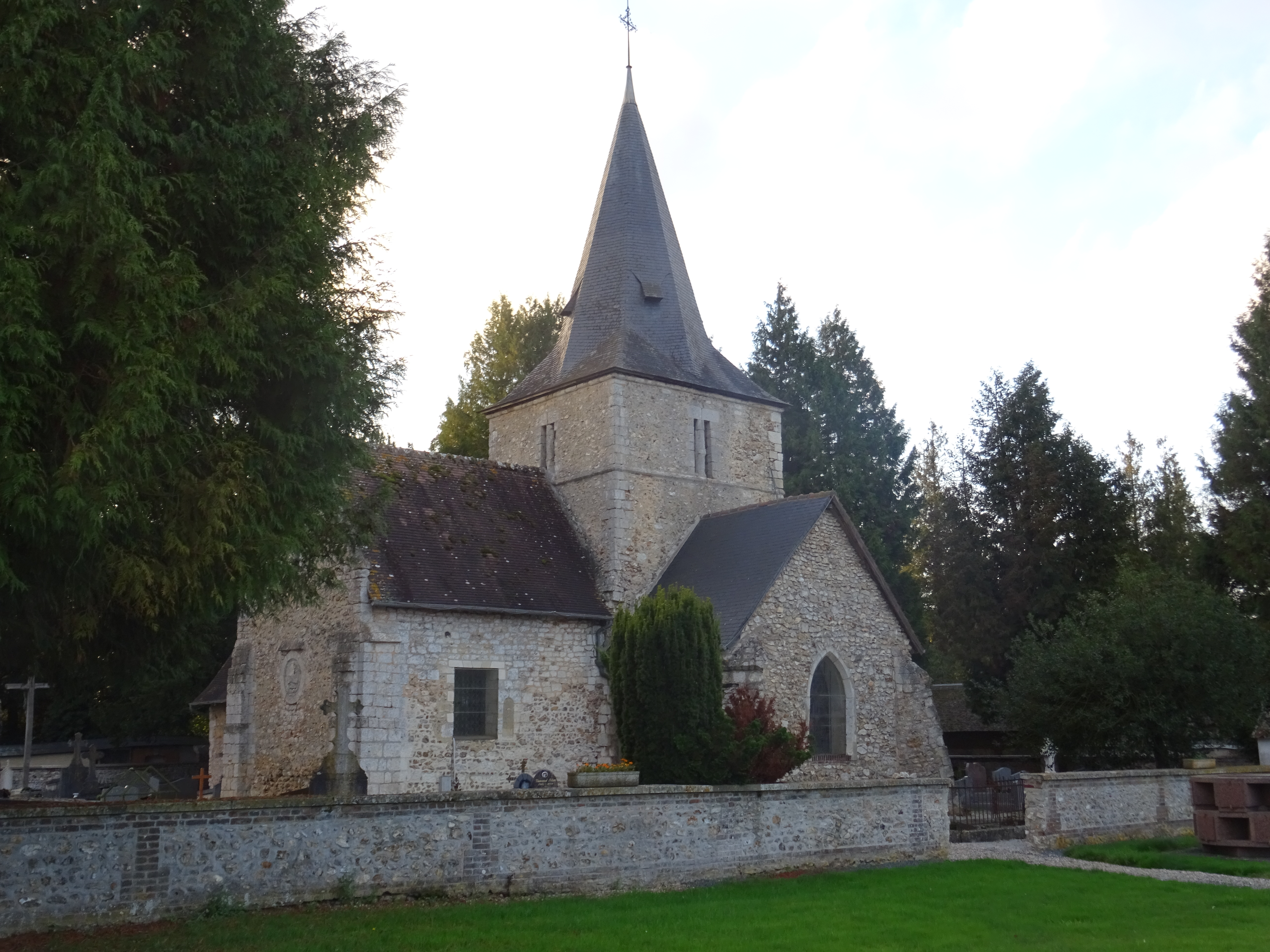 Eglise de Thierville (Eure - France)